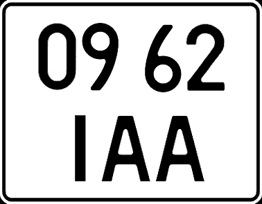 Задний номерной знак автомобилей юридических лиц Украины, стандарт 1992 года